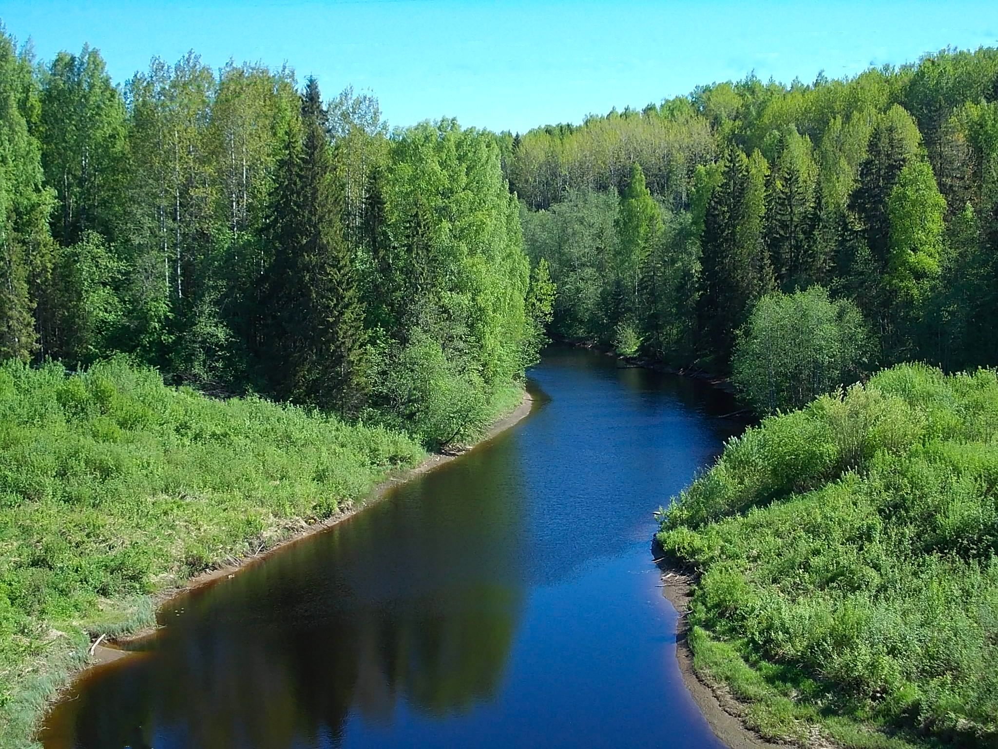 Река Яндеба у автодороги Р-37